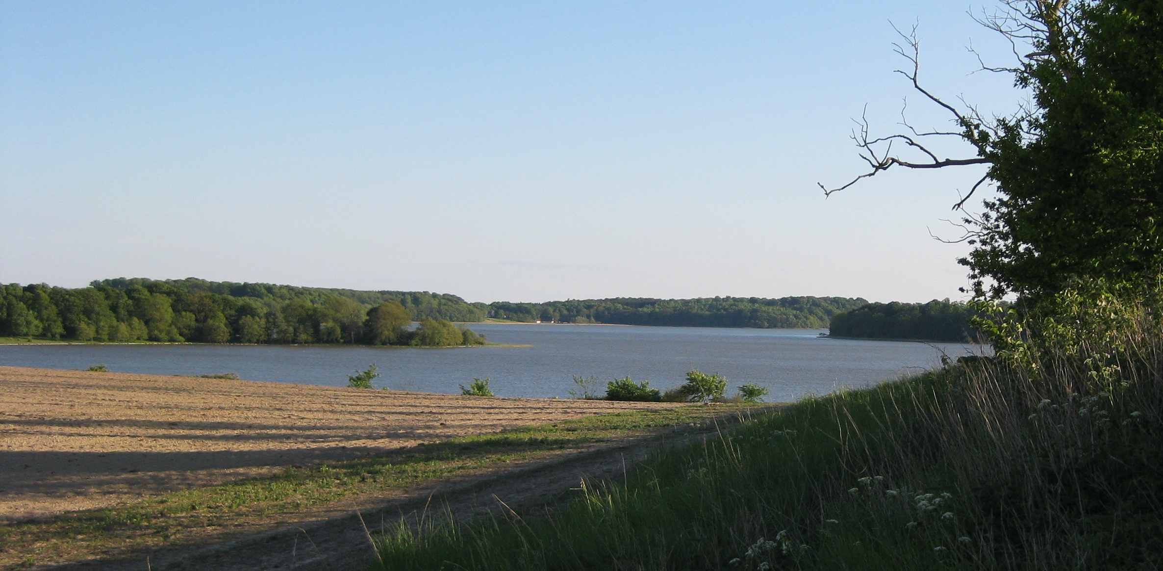 Börringesjön, Skåne, Sweden